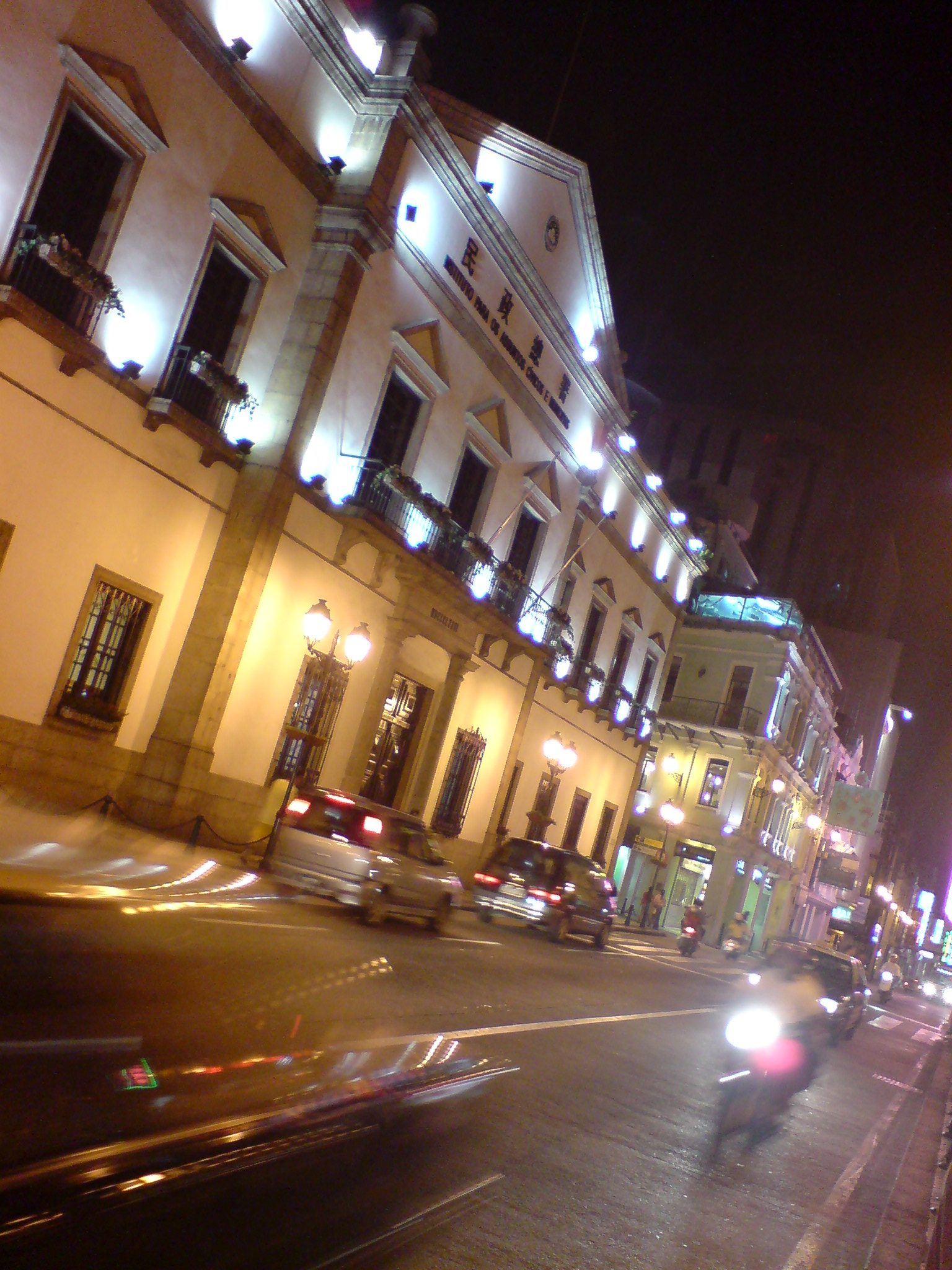 中文（香港）: 民政總署夜景